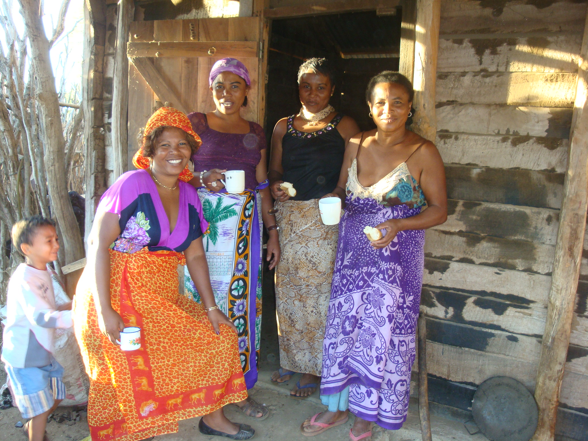 Les femmes de la famille prennent leurs petits déjeuné avant de se mettre au travail dans les champs.